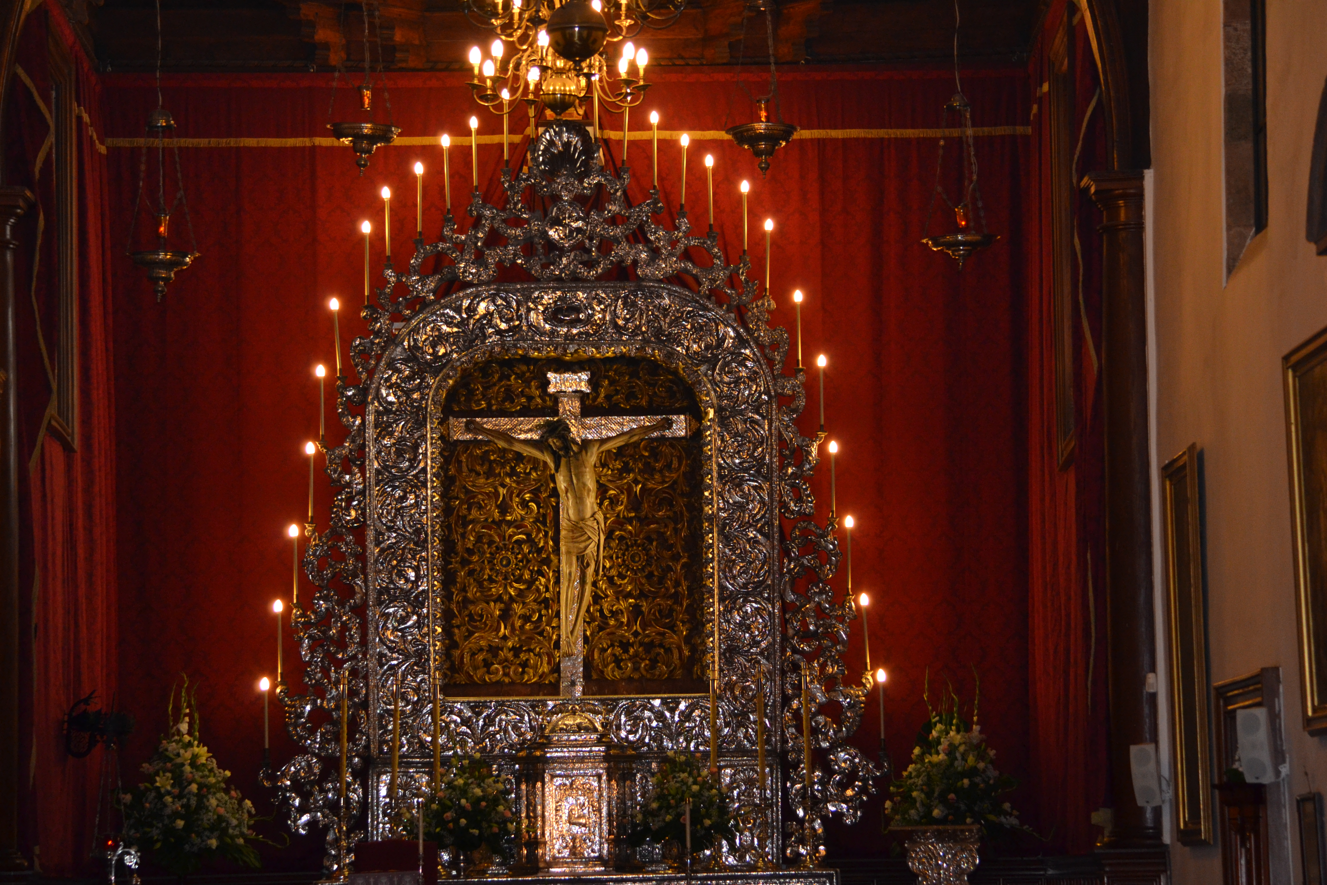 Colección Cristo de La Laguna by elduendesuarez